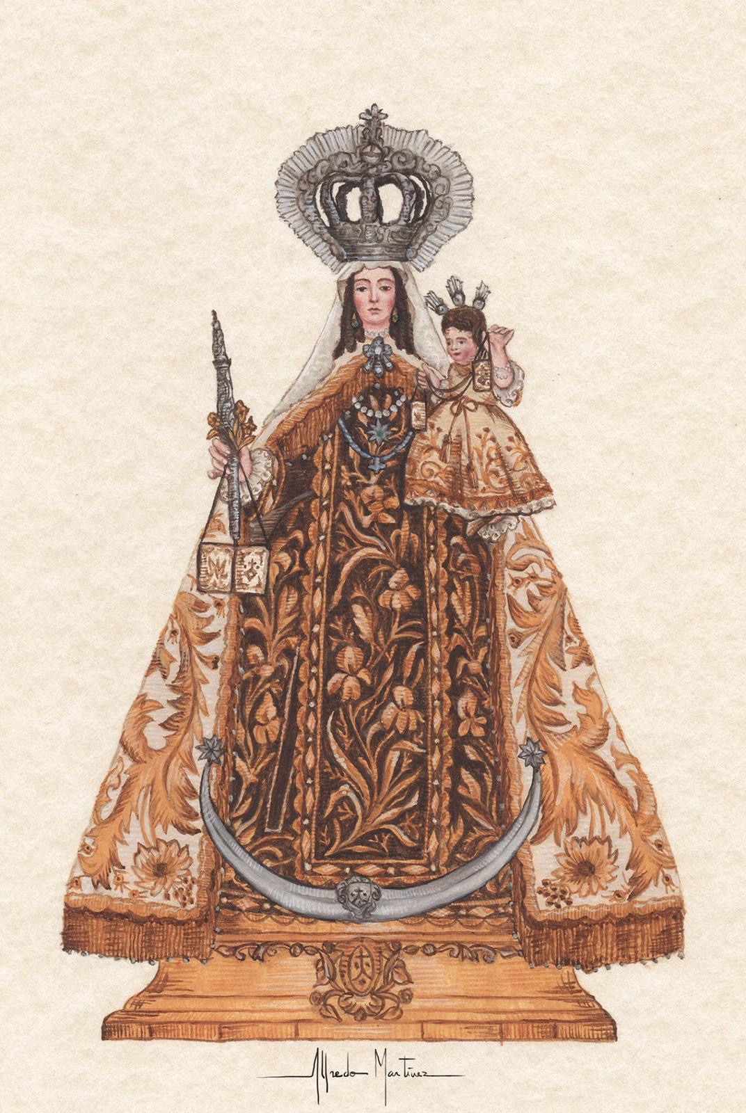 dibujo